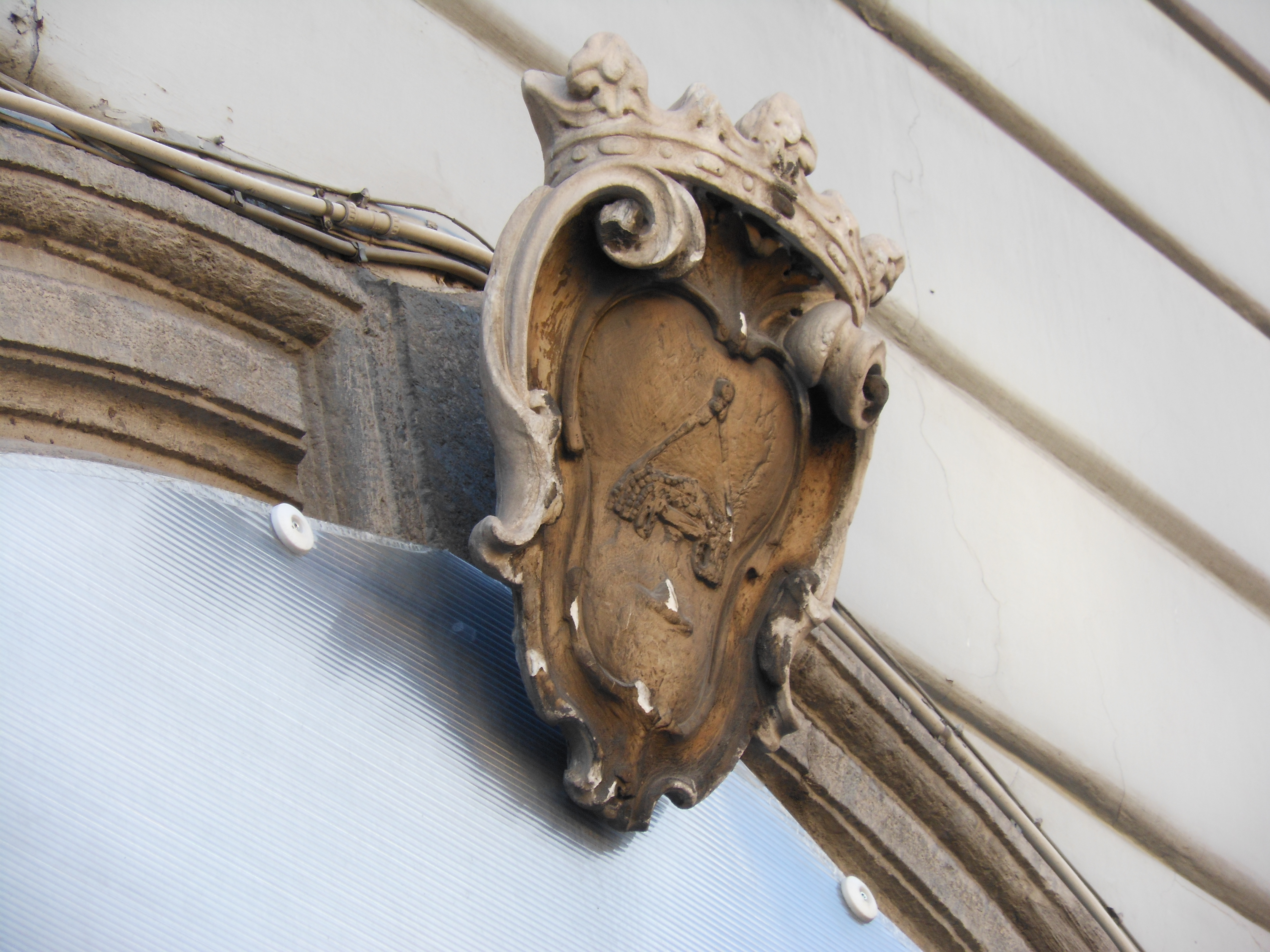 Stemma sul portale dell'ex-monastero di Santa Maria della Purità degli Orefici presso via Santa Teresa degli Scalzi a Napoli